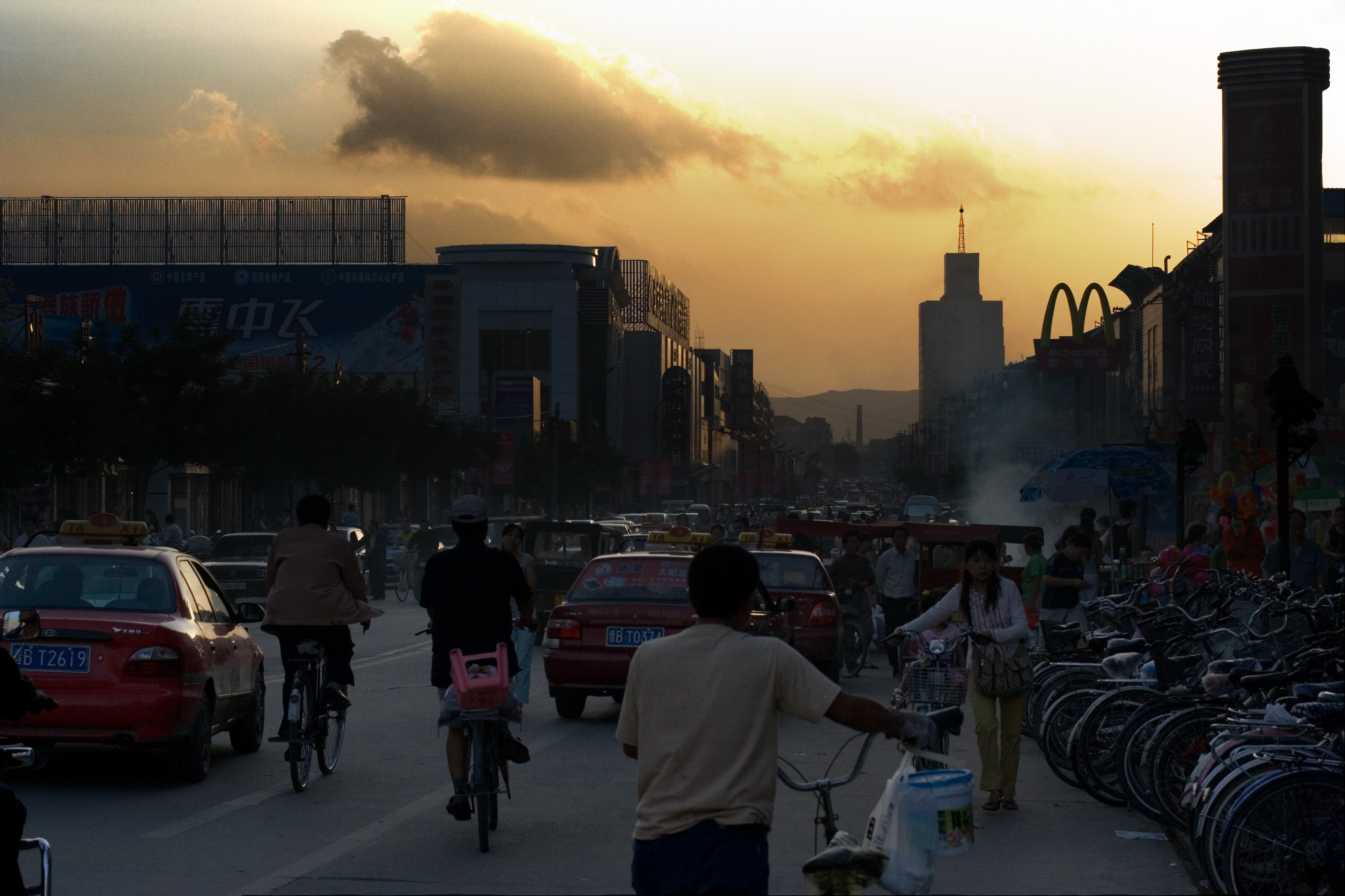 Datong, Shanxi, China